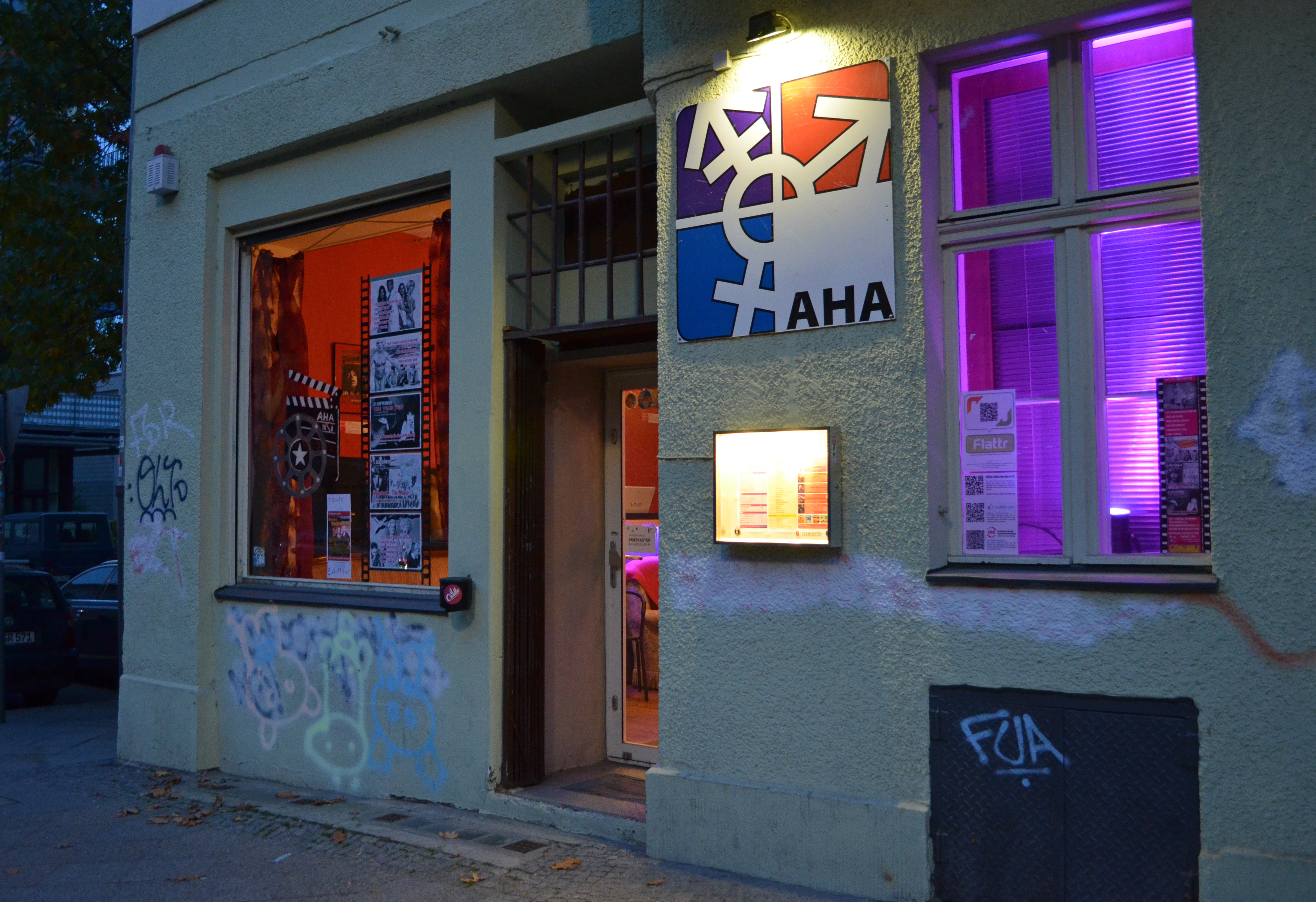 Die im Oktober 2010 eröffneten Räume des AHA-Berlin e.V. in der Monumentenstraße 13 in Berlin Schöneberg.